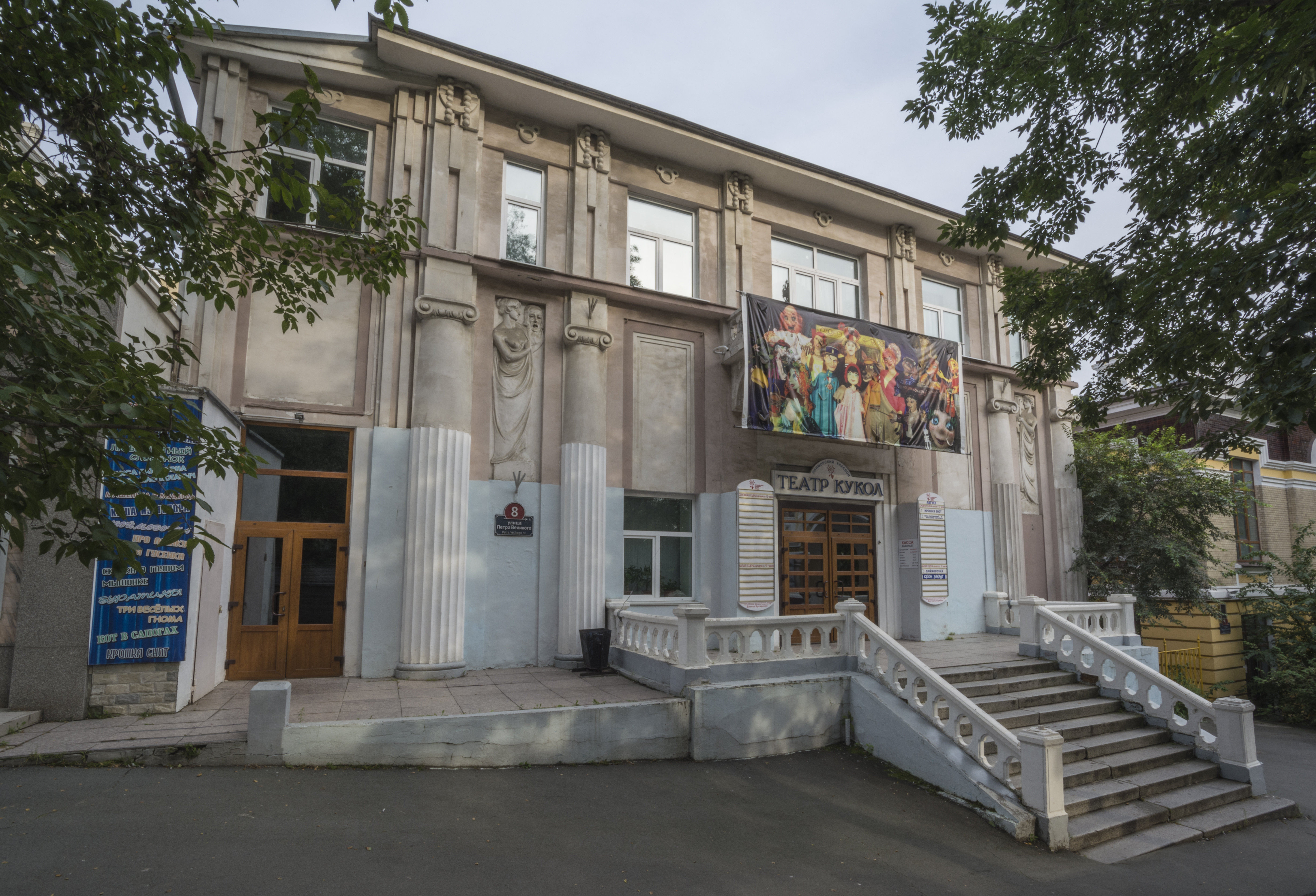 Здание «Нового театра»: улица Петра Великого, 8, Владивосток